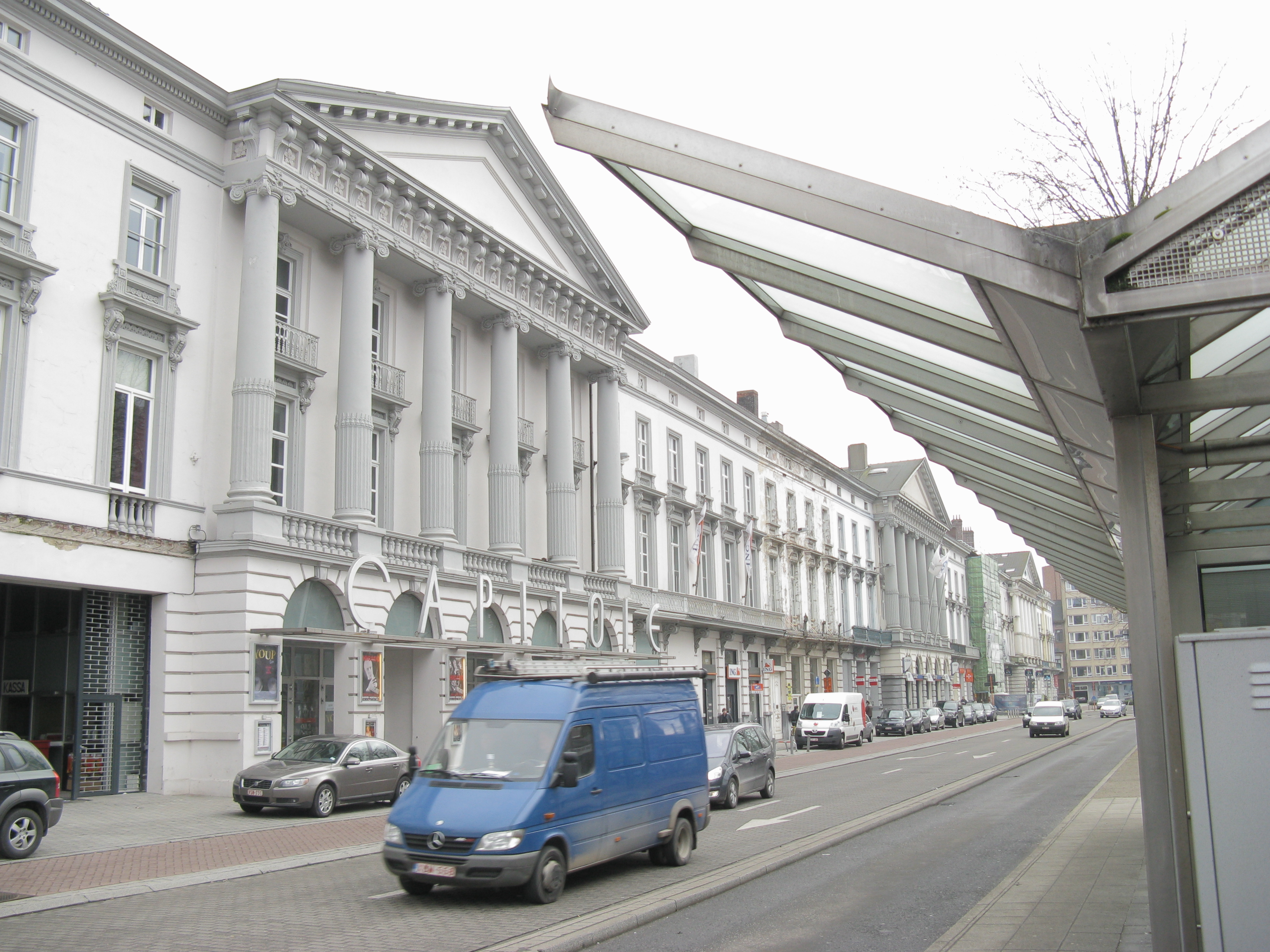 Huizenrij met concertzaal 'Capitole' aan het Graaf van Vlaanderenplein (Zuid) in Gent.